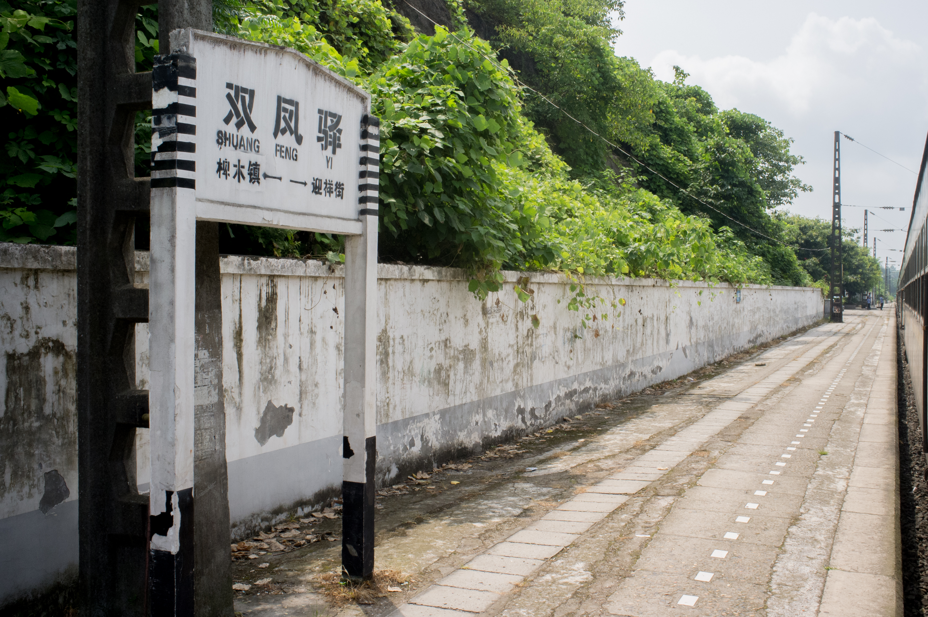 中文（中国大陆）: 成渝铁路双凤驿站